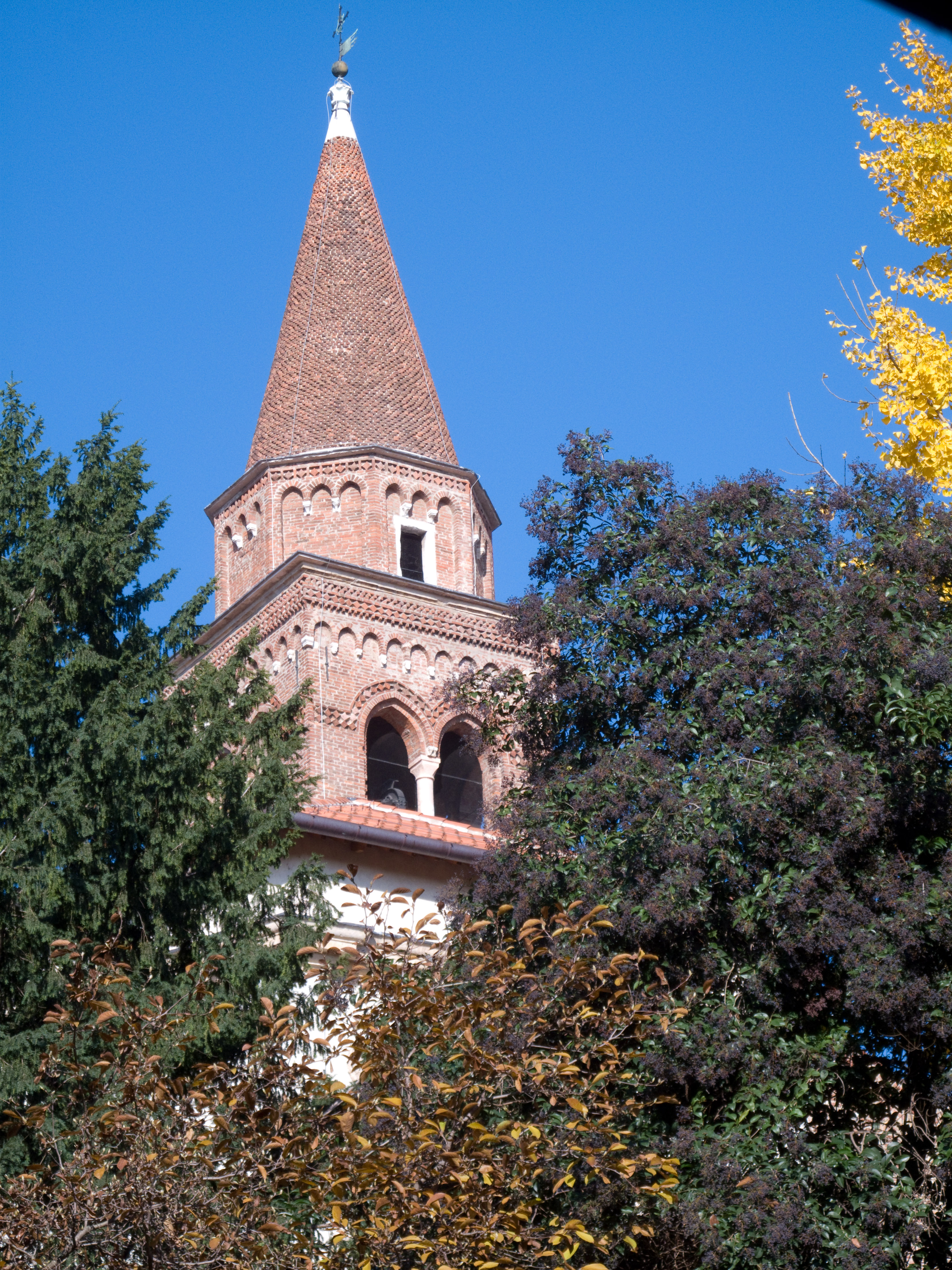 Vicenza - Chiesa di Santa Corona - Campanile